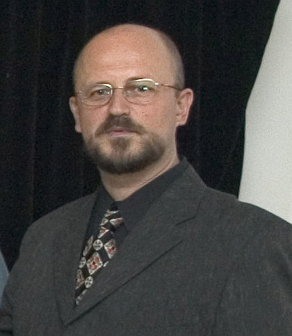 Jiří Stránský (politik), * 21. března 1956 Moravská Třebová. Vernisáž v Muzeu Kroměřížska 2002